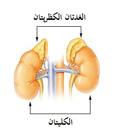 الغدة الفوق كلوية (الغدة الكظرية)